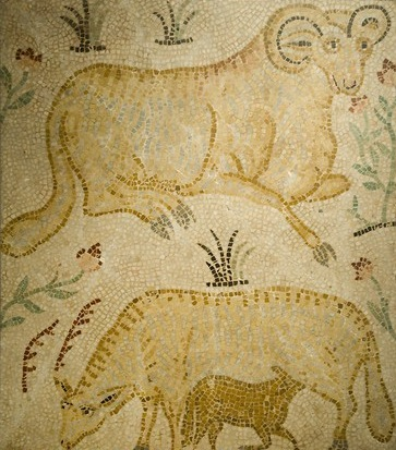 mosaique de rusguniae